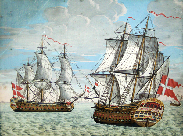 Danish: To 60-kanoners-skibe, forrest til højre ISLAND, 1751, som braser bak, bagest til venstre formodentlig et af søsterskibene, NEPTUNUS, SÆLLAND eller STORMARN.